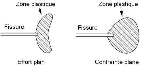 Mécanique de la rupture - Irwin - Zone plastique